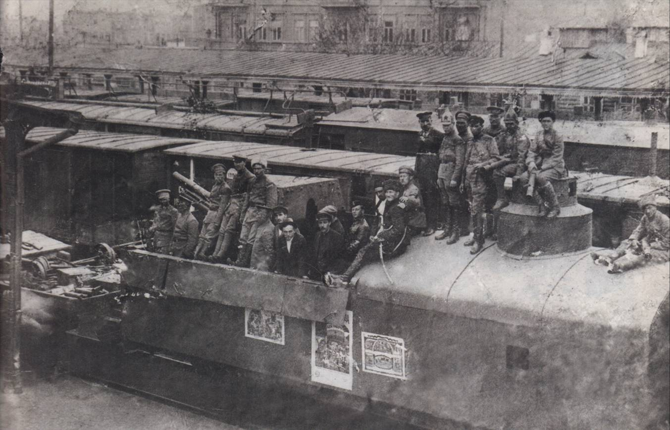 Бронепоезд III Интернационал в Баку в 1920 году